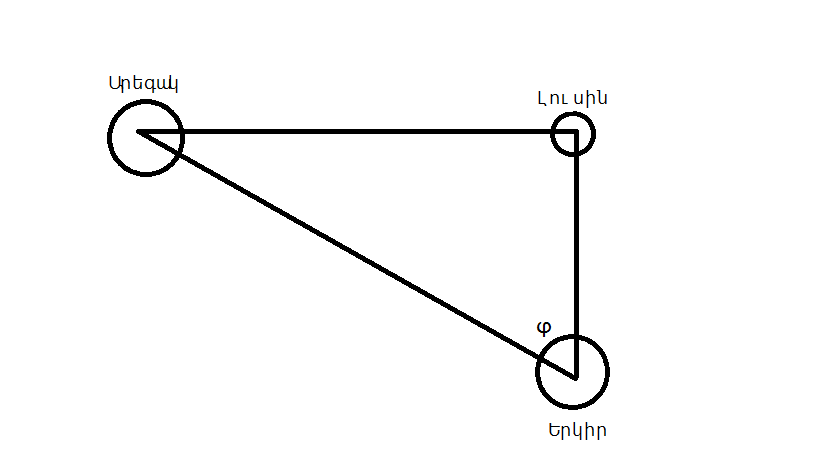 Aristarchus-Moon-Earth-Sun